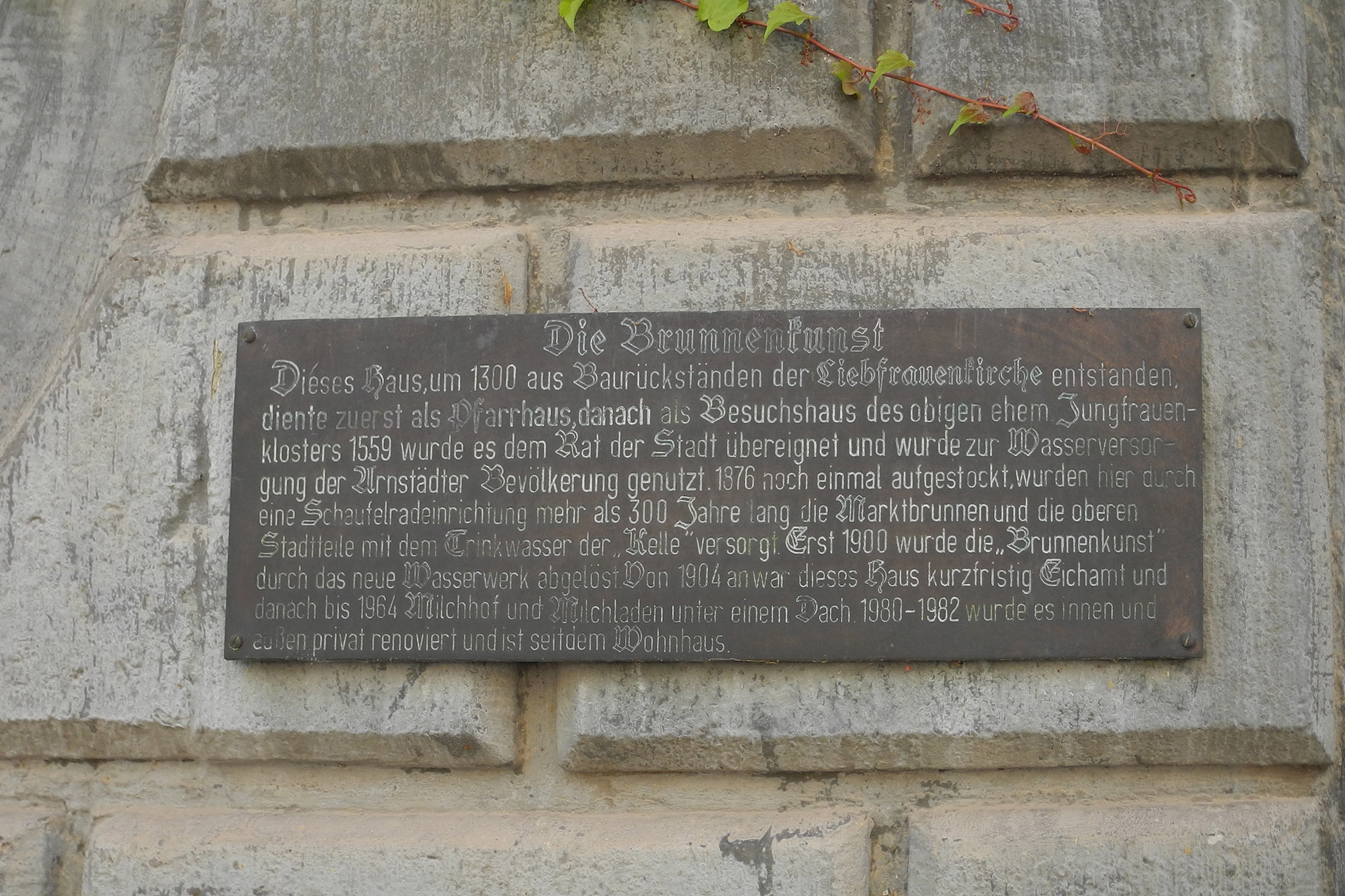 Tafel an der ehem. Brunnenkunst in Arnstadt, jetzt Wohnhaus An der Brunnenkunst 3